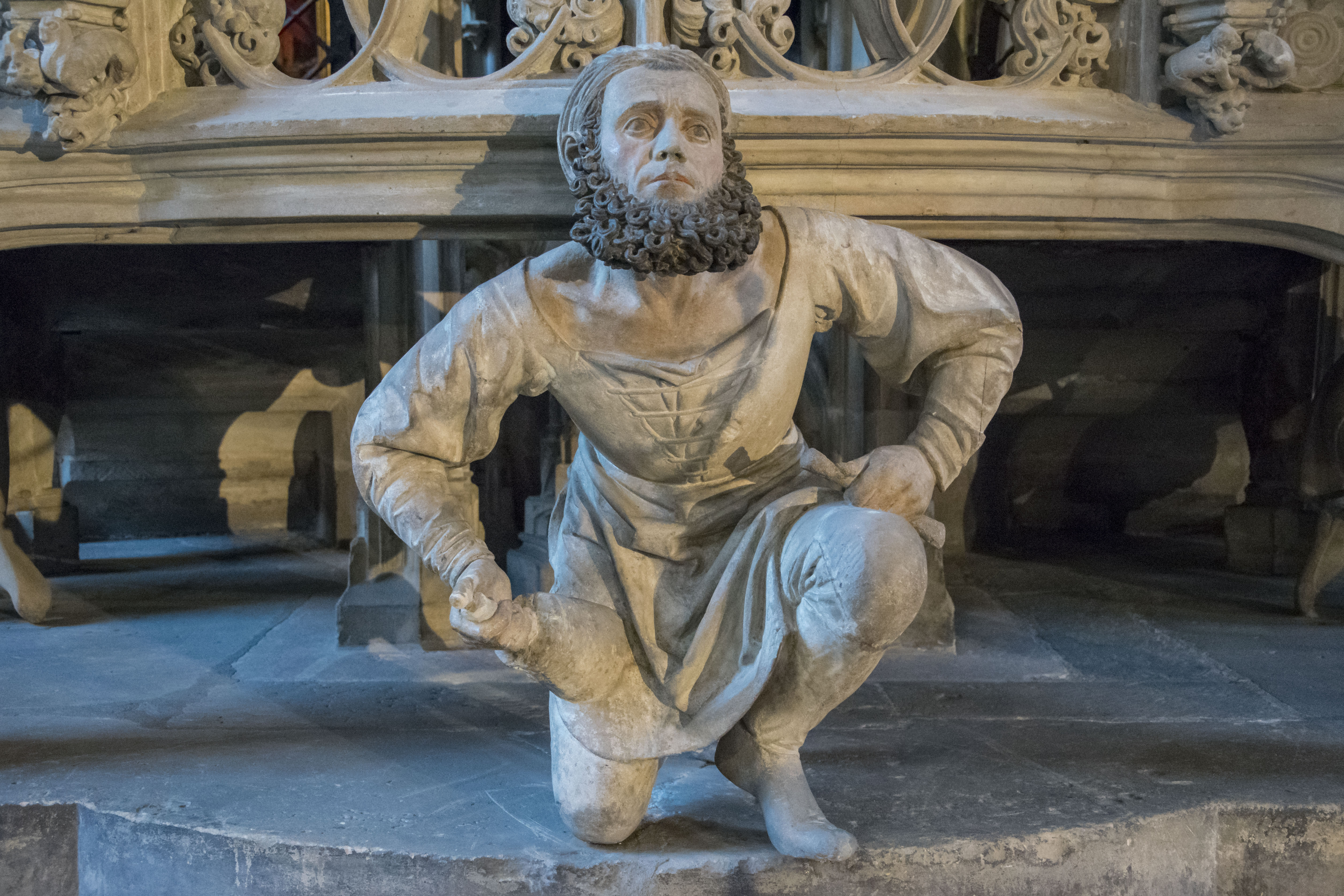 Vermutlich das Selbstbildnis von Adam Kraft